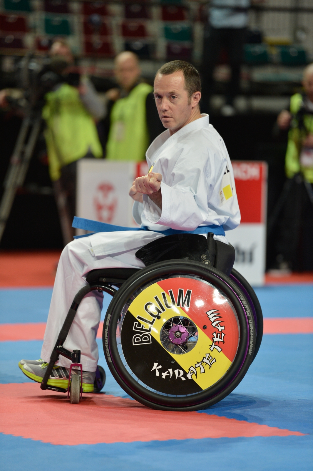 Franck Duboisse , champion du monde Kata wheelchair WKF2014